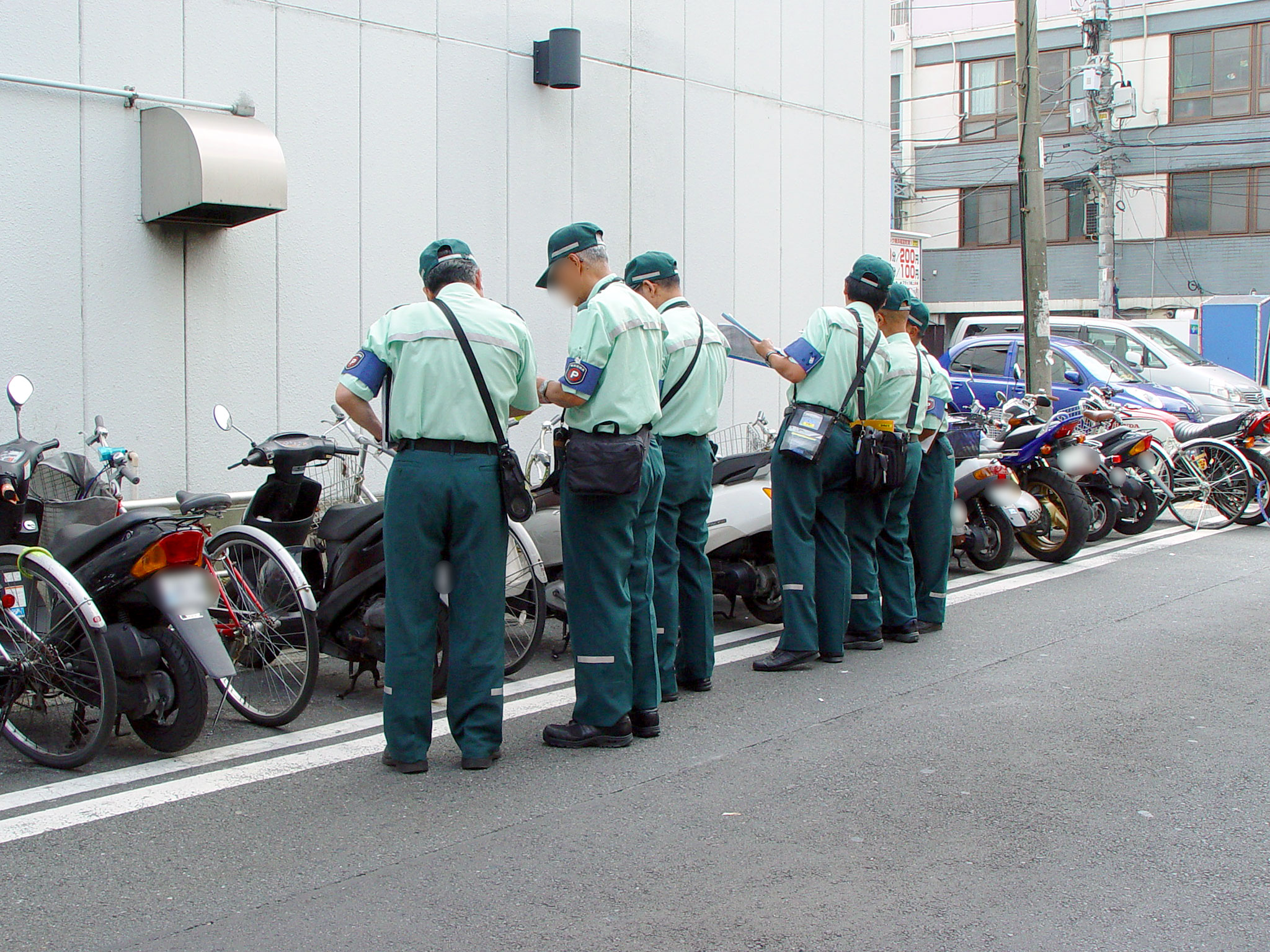 Parking warden in Japan.